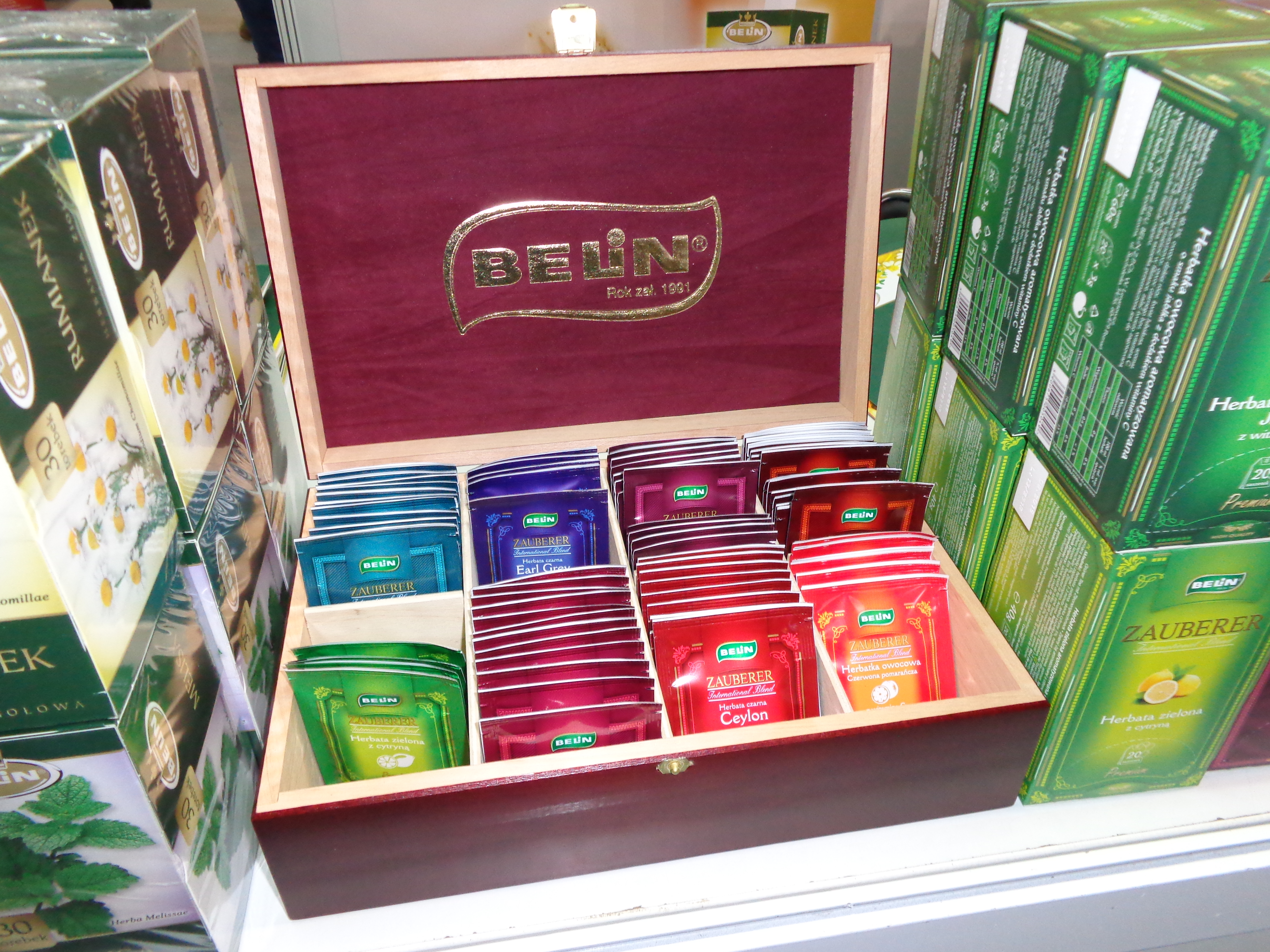 Asortyment Herbat "Belin" prezentowany podczas Targów HORECA 2013 w Krakowie.